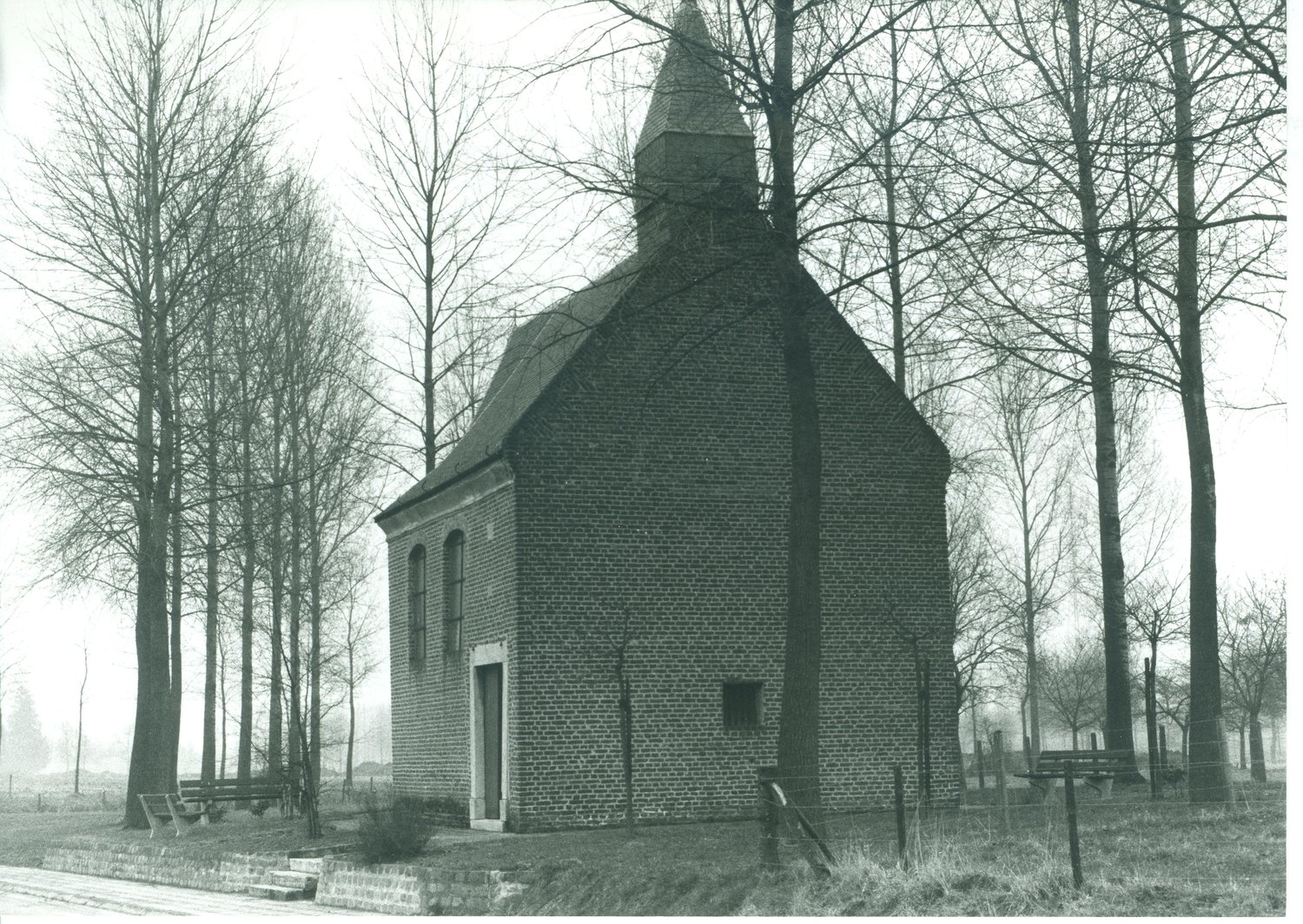 Alken Hemelsveldstraat zonder nummer